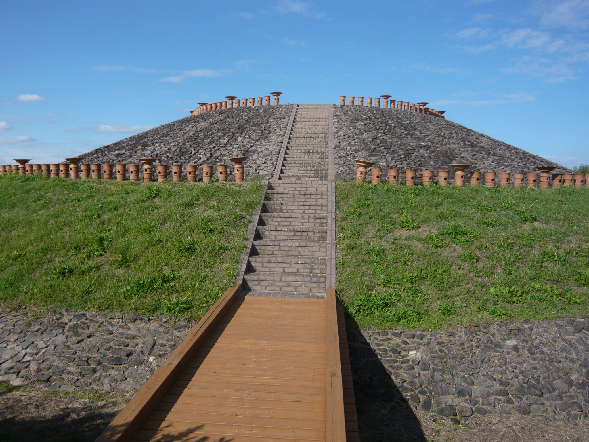 三吉石塚古墳 Mitsuyoshi Ishizuka tumulus 2010.10.27